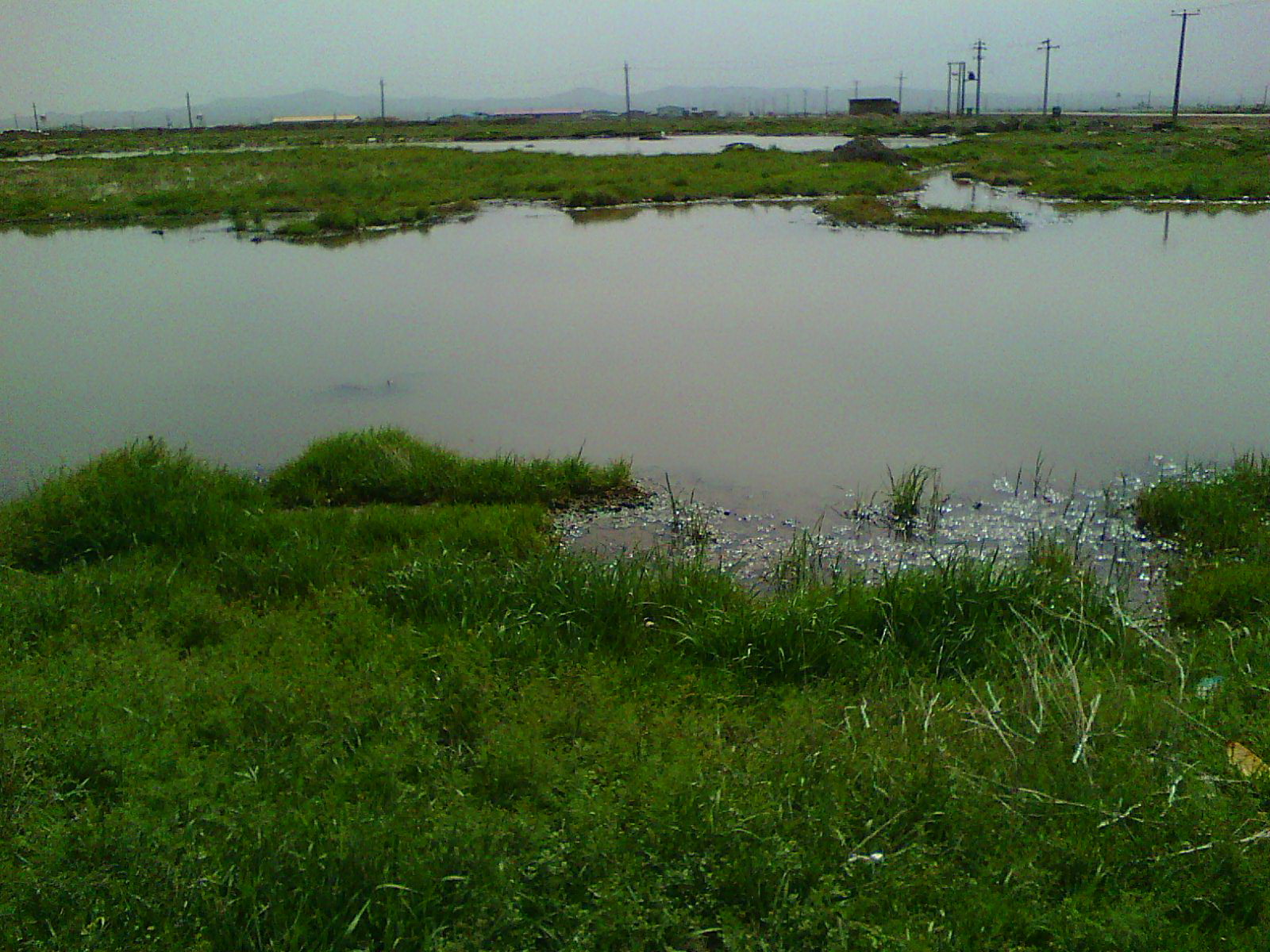 بقایای دریاچه باستانی زریوار